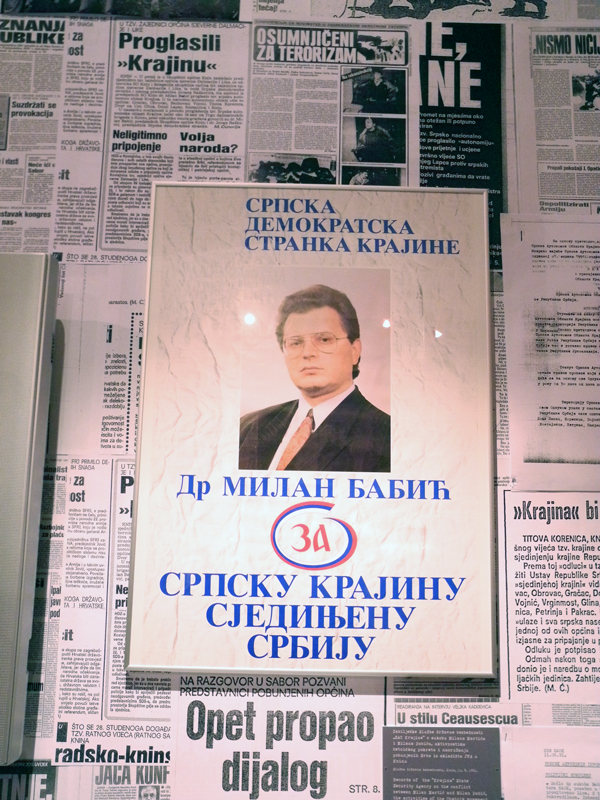 Izložba Domovinski rat u Hrvatskom povjesnom muzeju tijekom Noći muzeja.